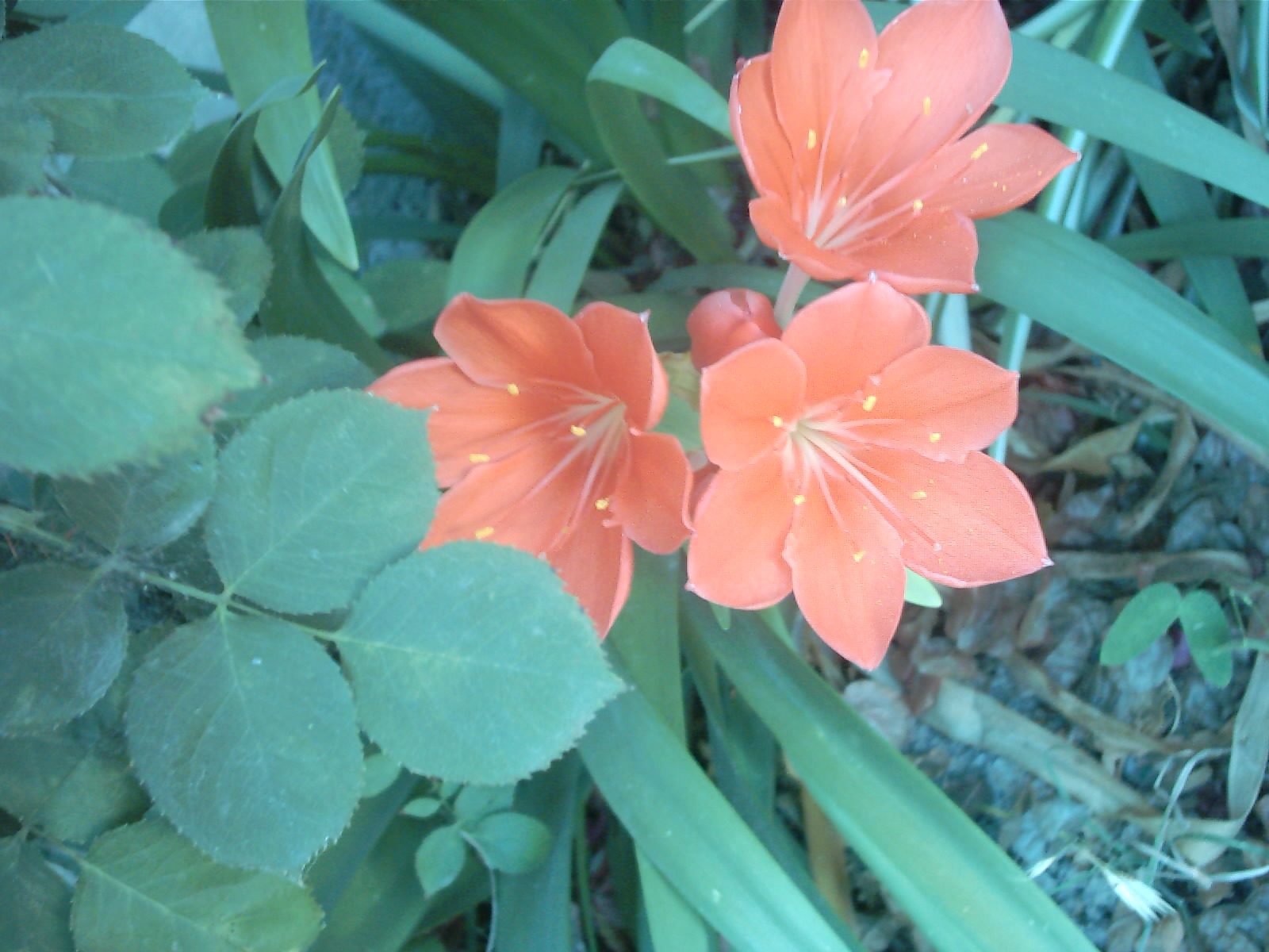 Una imagen de la flor de Clelia